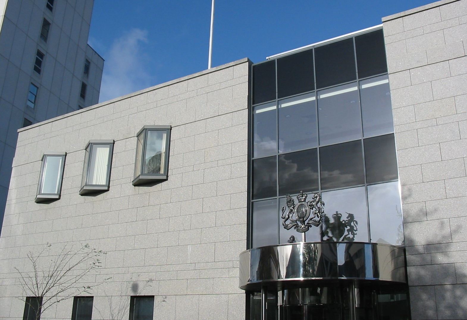 Magistrate's Court